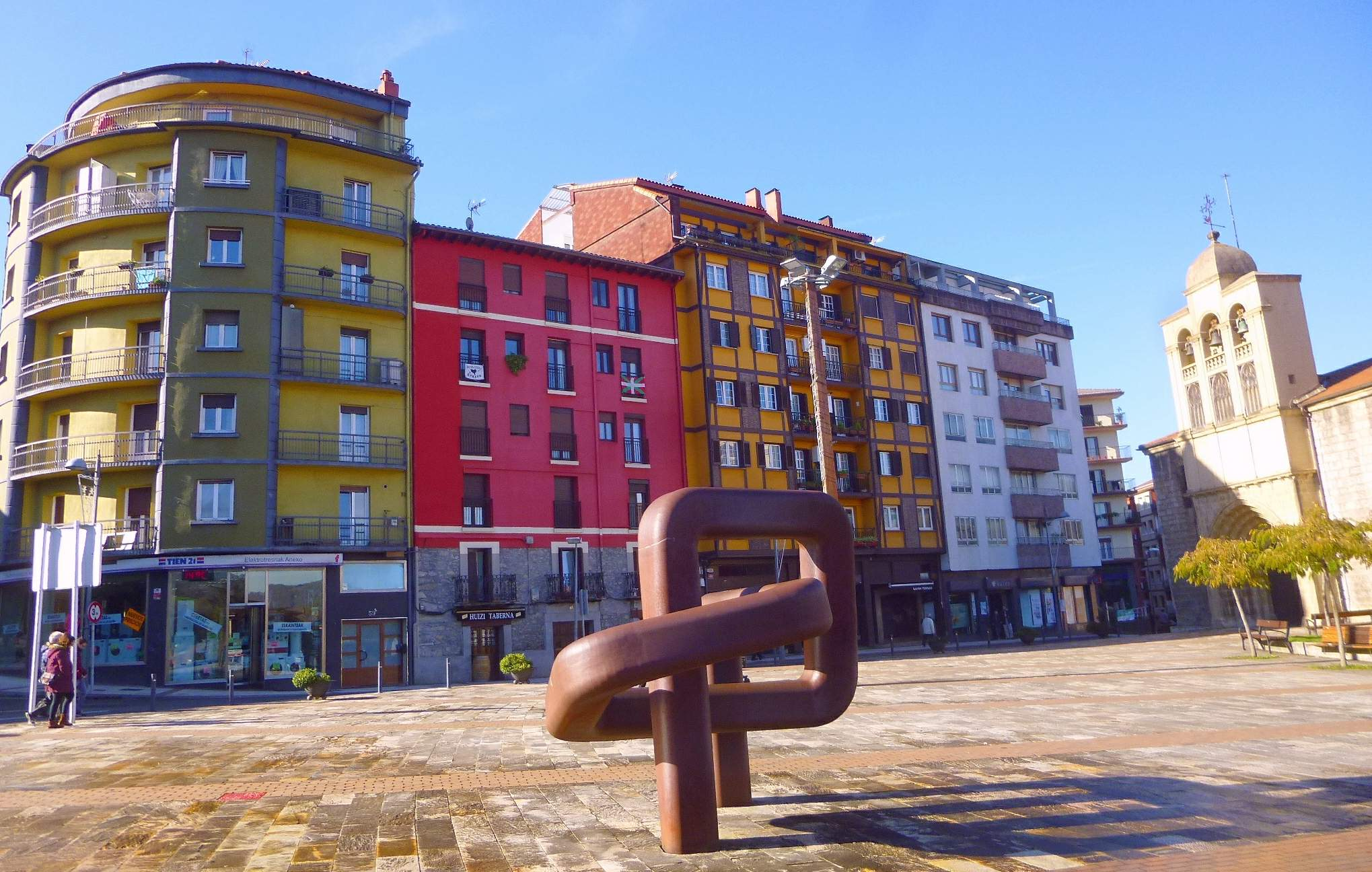 Calle Mayor de Hernani (Guipúzcoa)